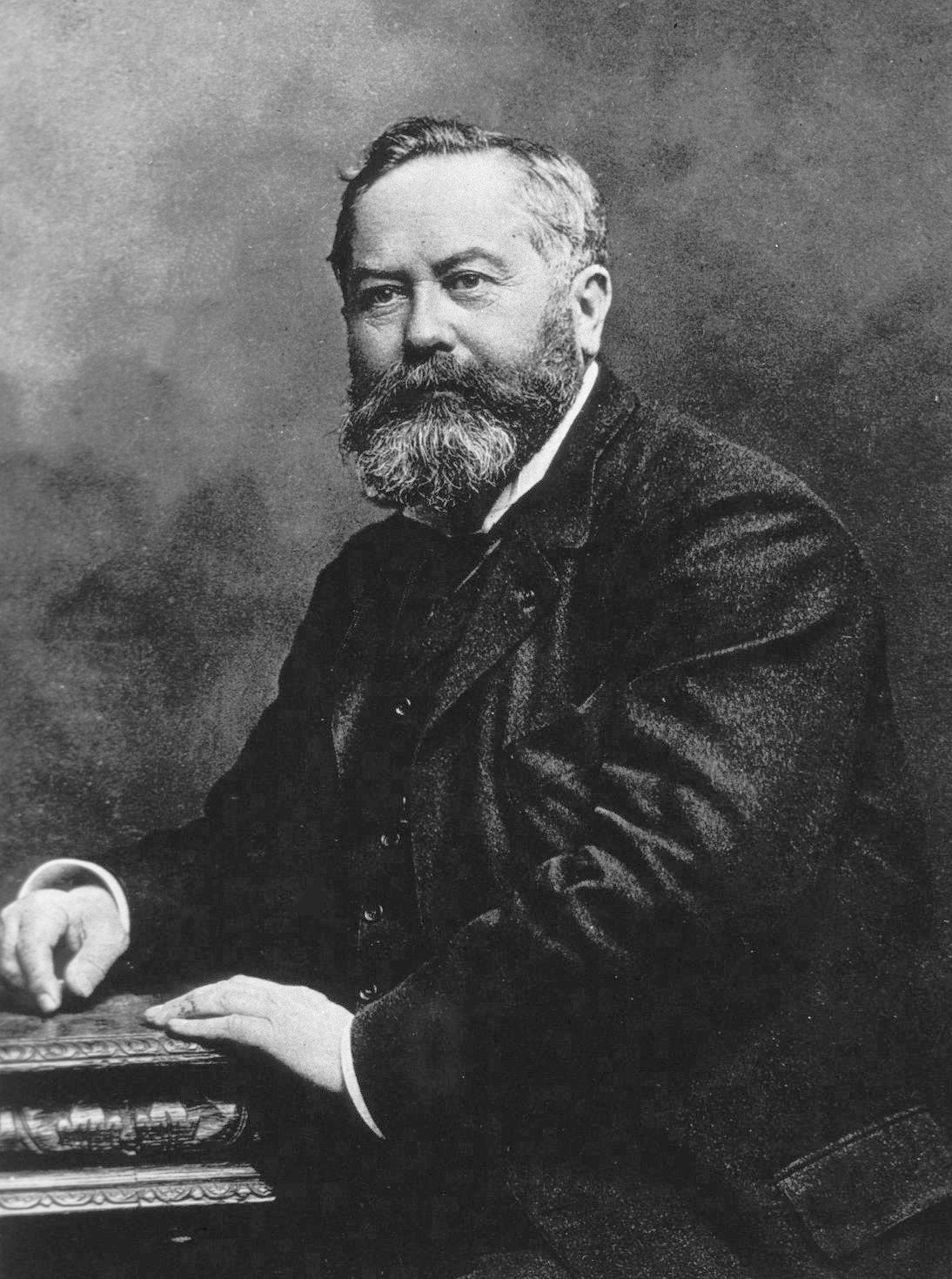 O auxiliar de Louis Pasteur, Charles Chamberland (1851 - 1908), inventor da autoclave e filtros de porcelana